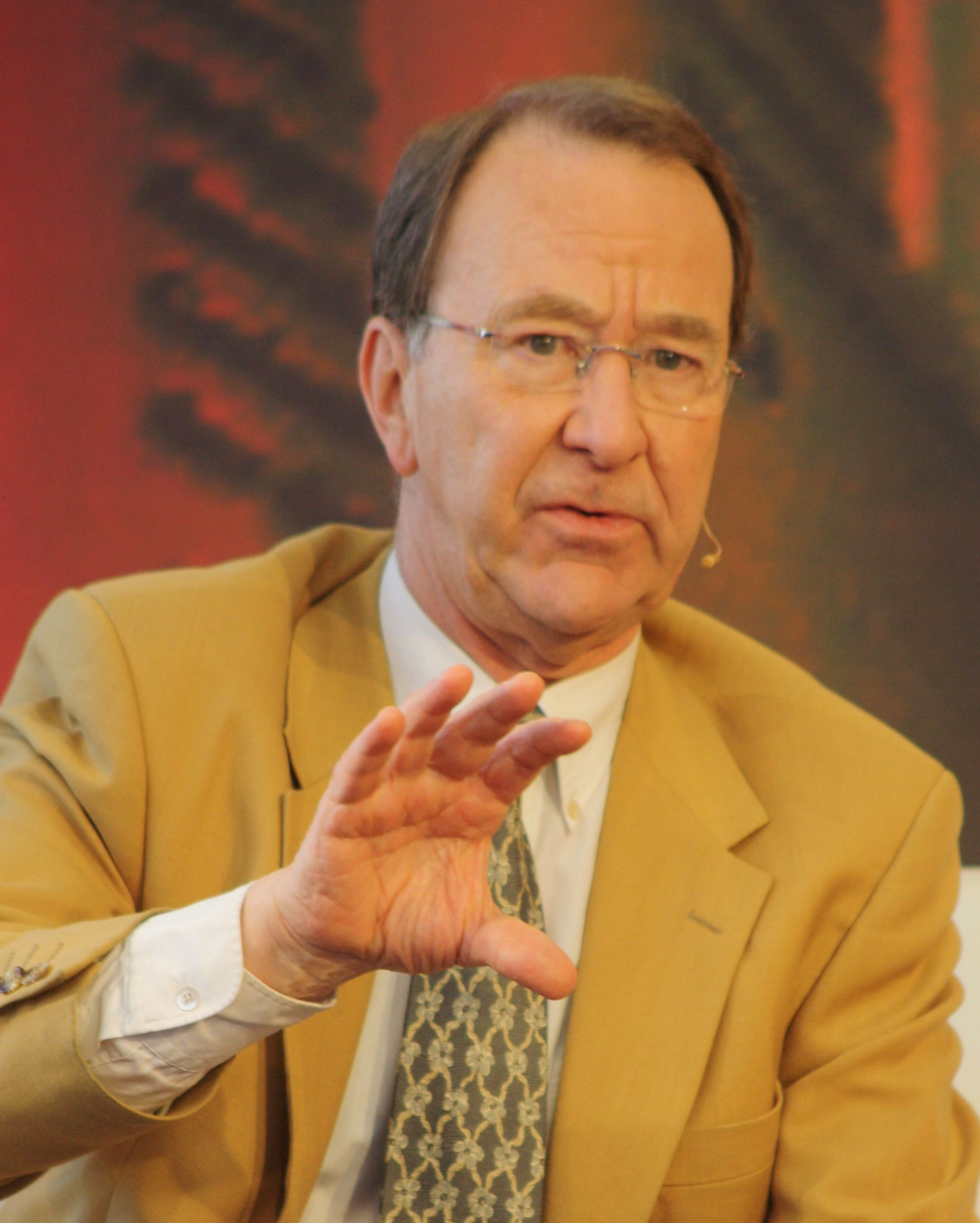 Historiker und Autor